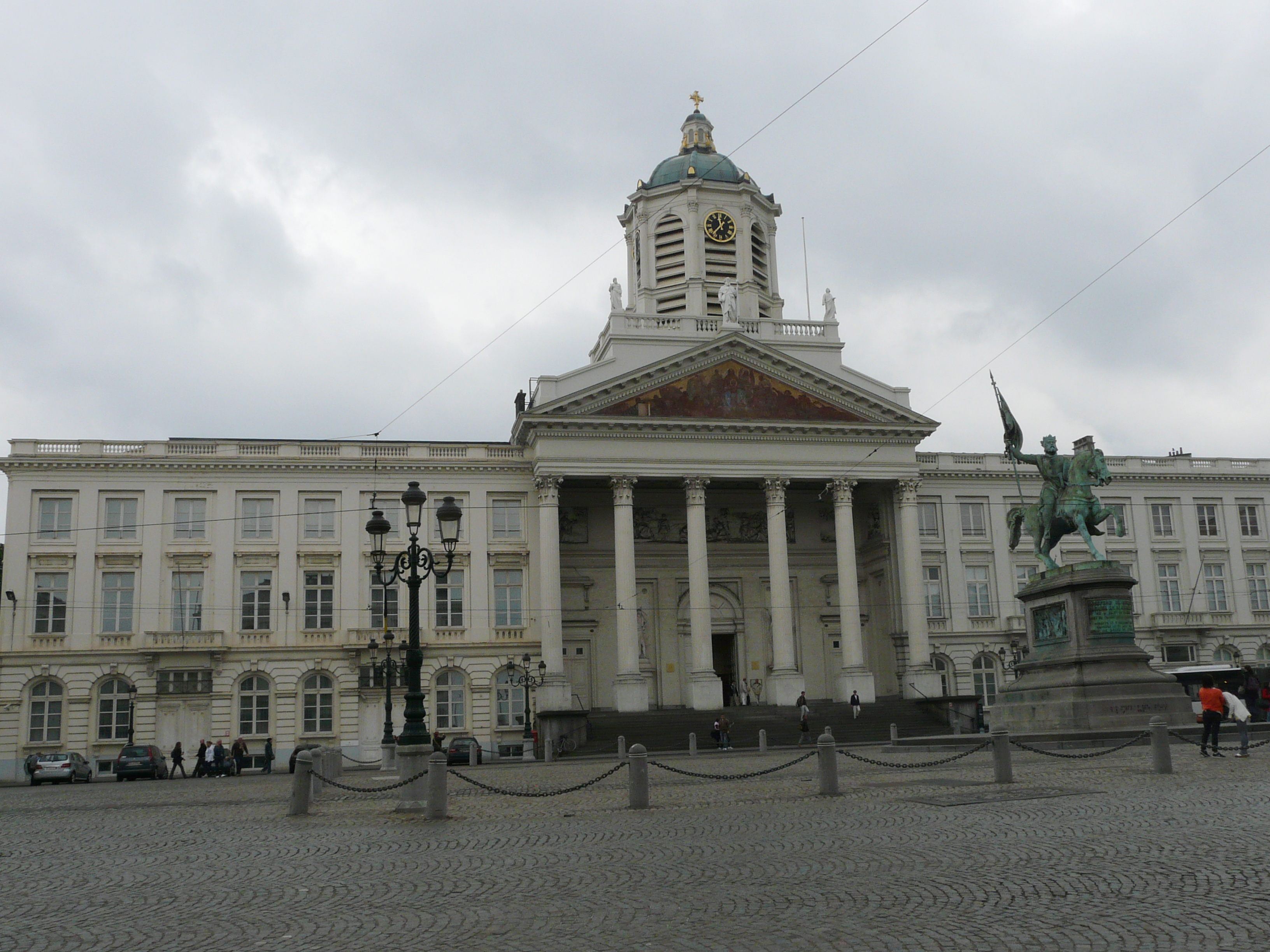 Place Royale/Koningsplein